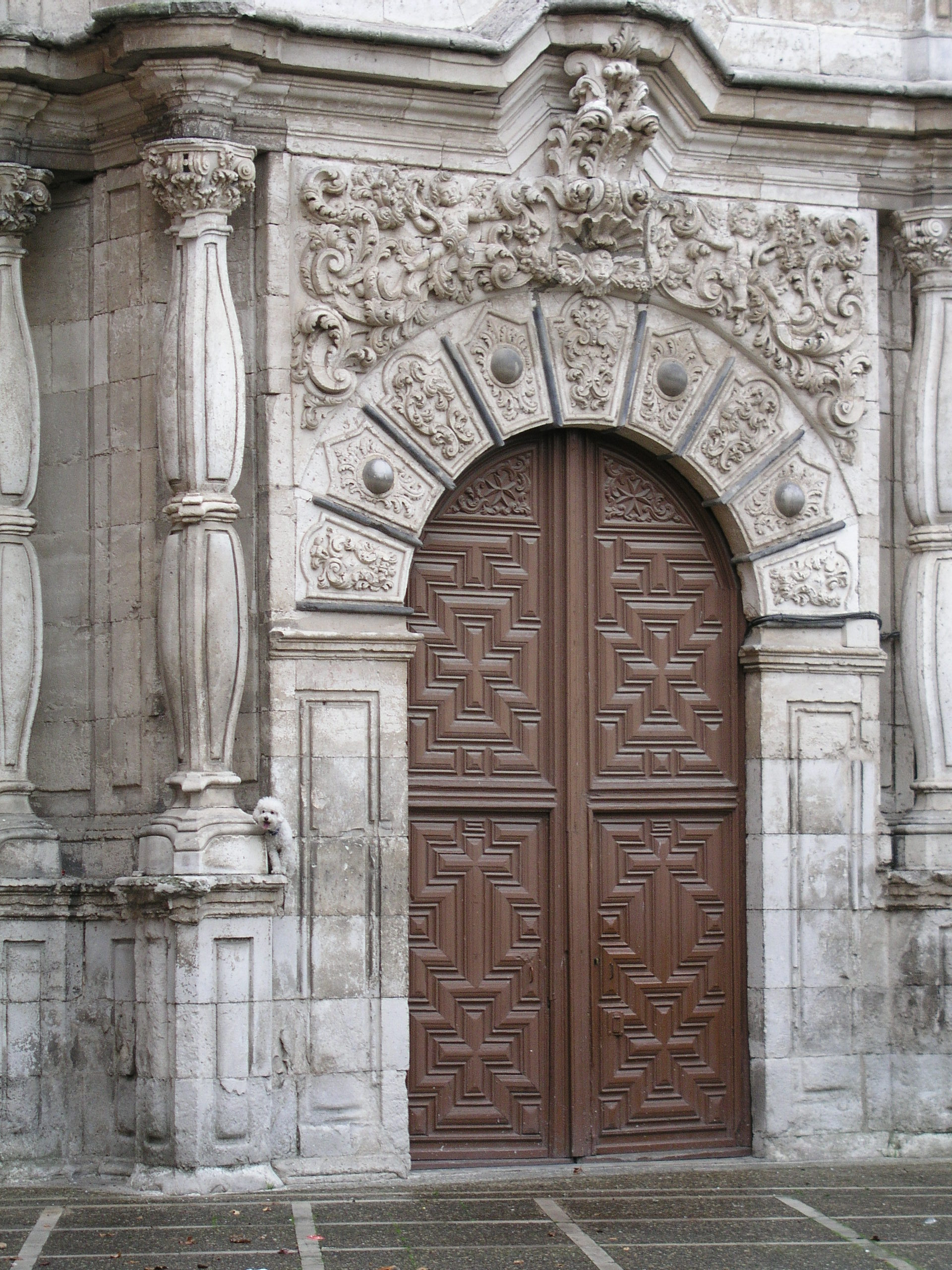 Portada barroca de la Iglesia de San juan de Letrán, Valladolid, España